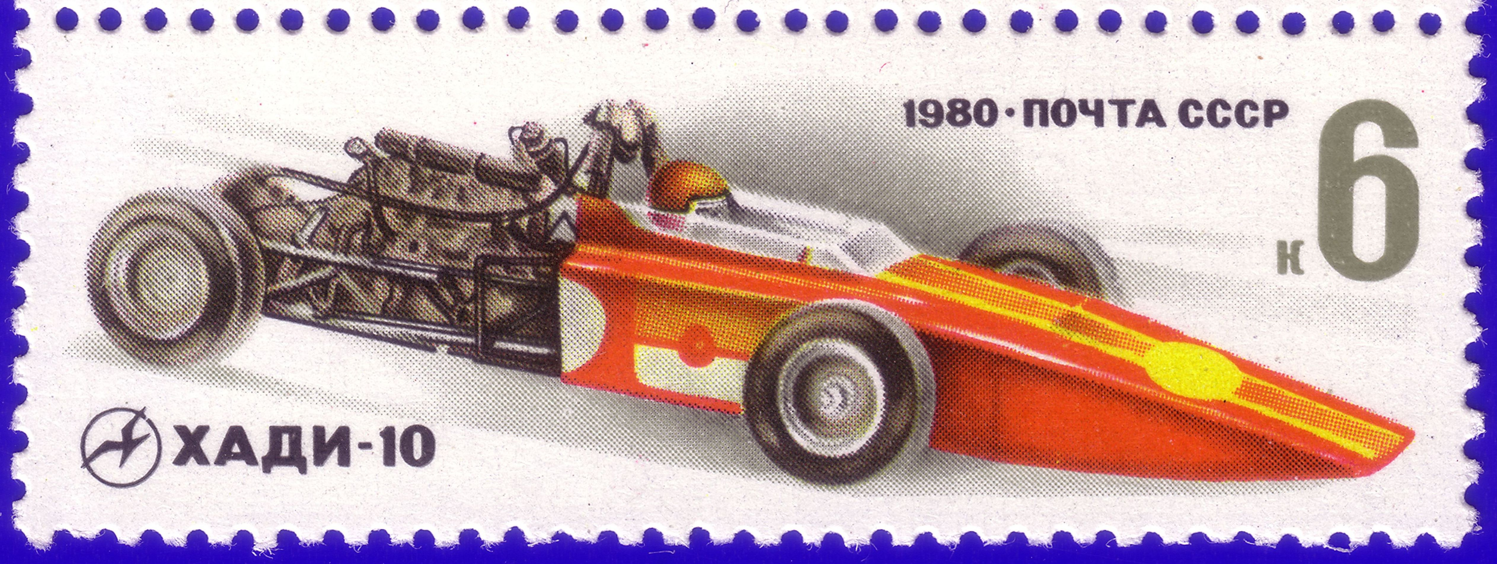 Почтовая марка СССР. 1980. ХАДИ-10. Номинал 6 копеек, чистая, ЦФА?